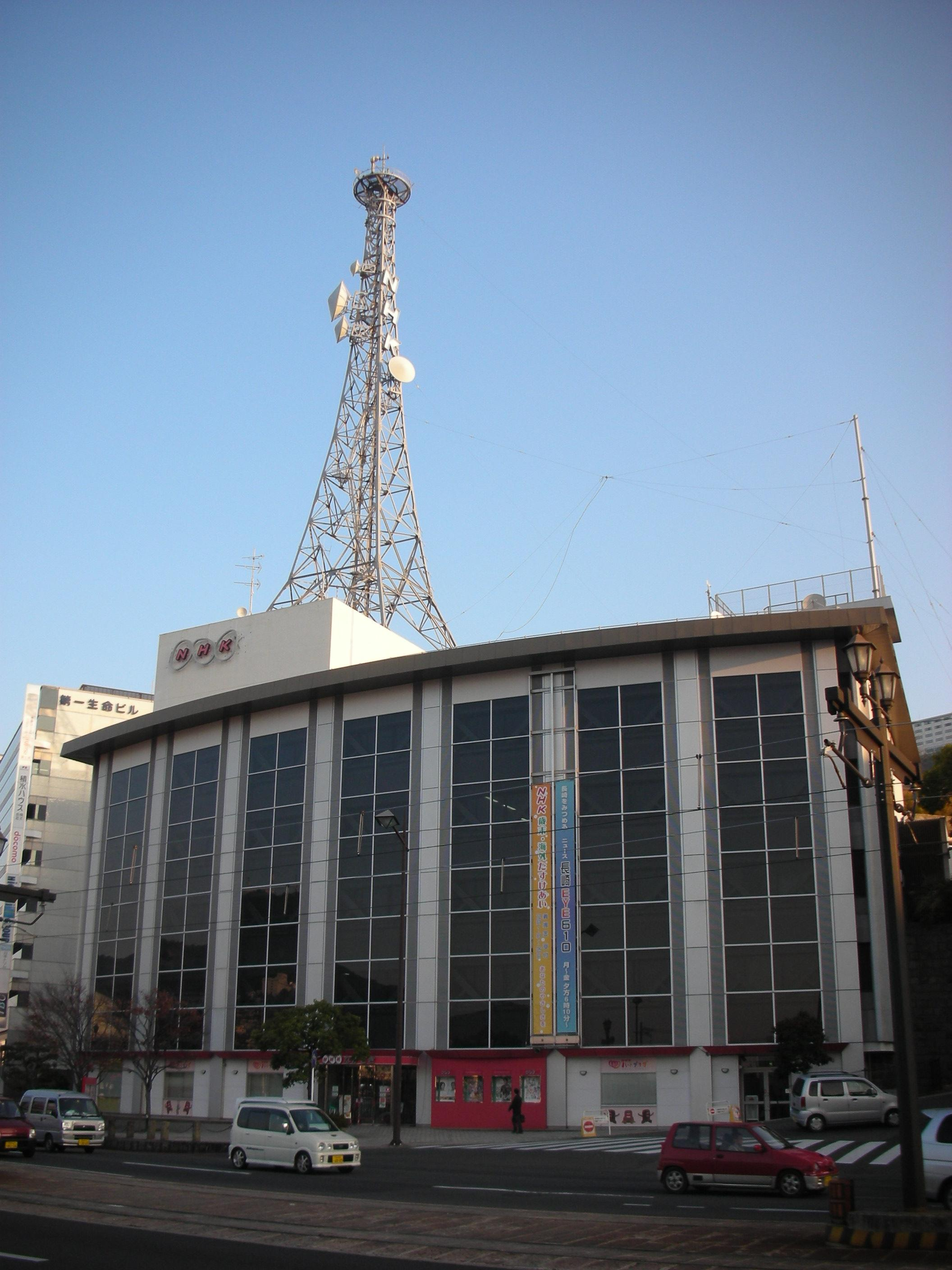 NHK長崎放送局